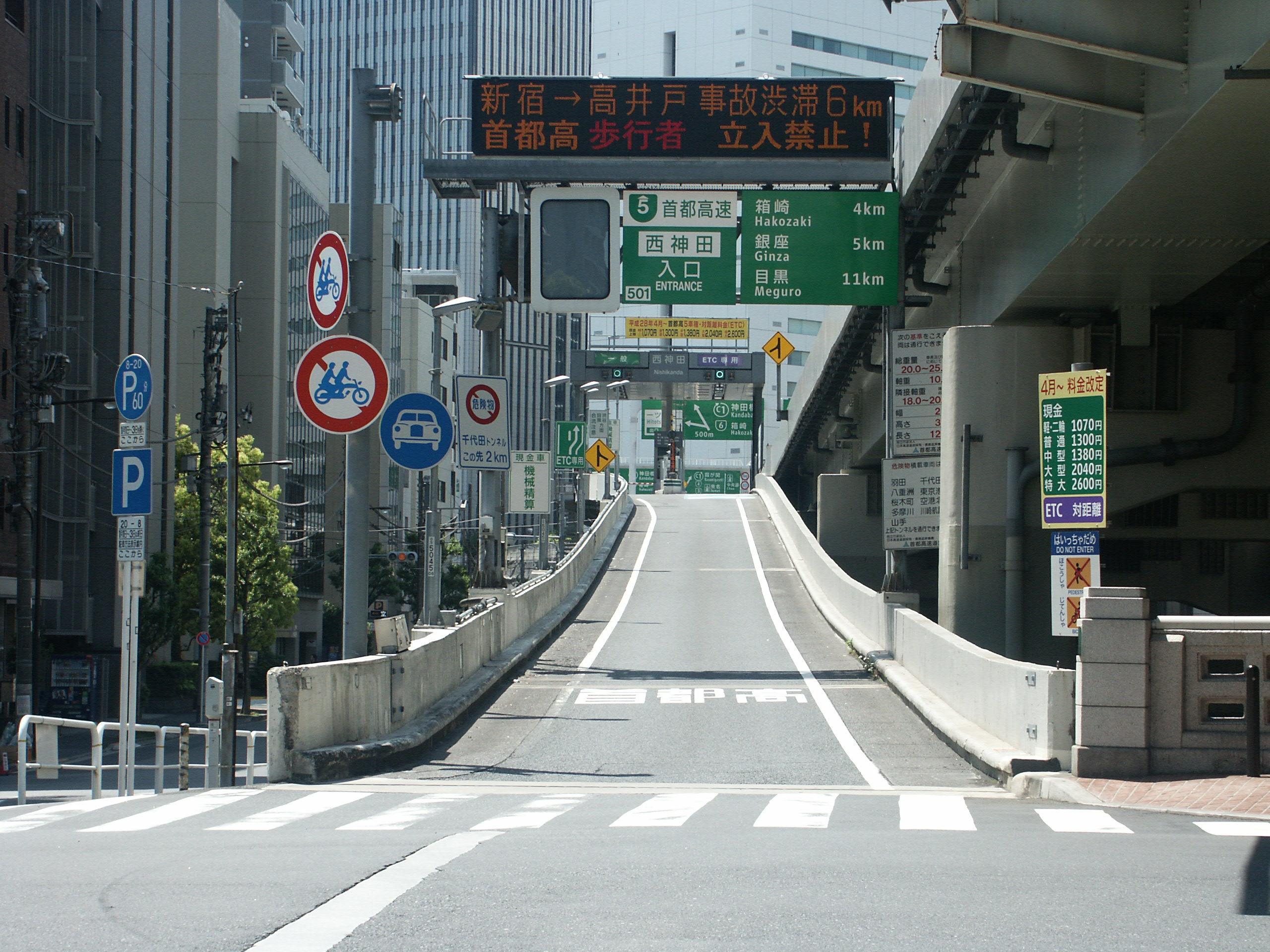 首都高速道路5号池袋線西神田入口